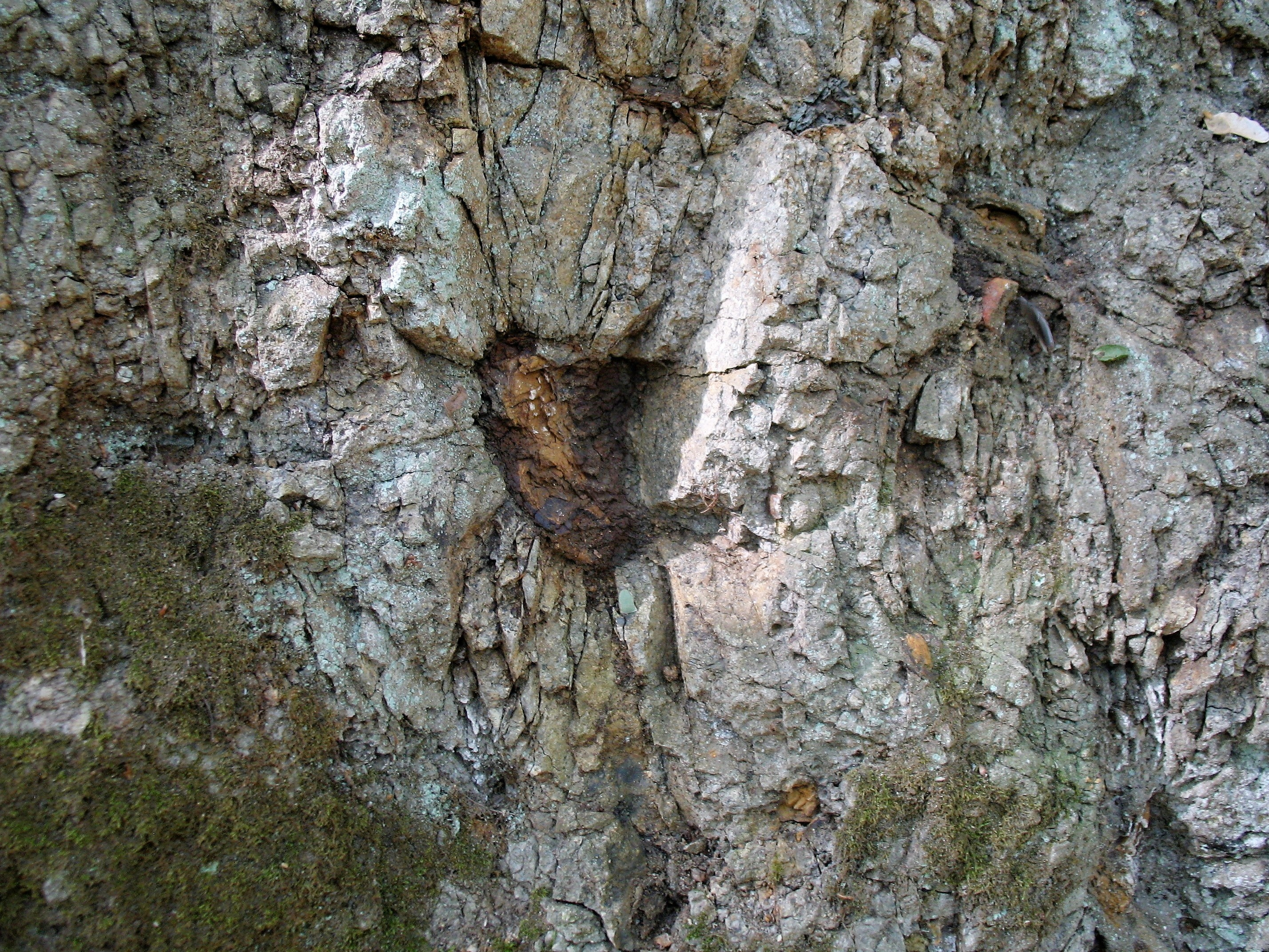 Malý lom s tzv. kamennými slunci na severním úpatí vrchu Linhorka, katastrální území Staré, okres Litoměřice